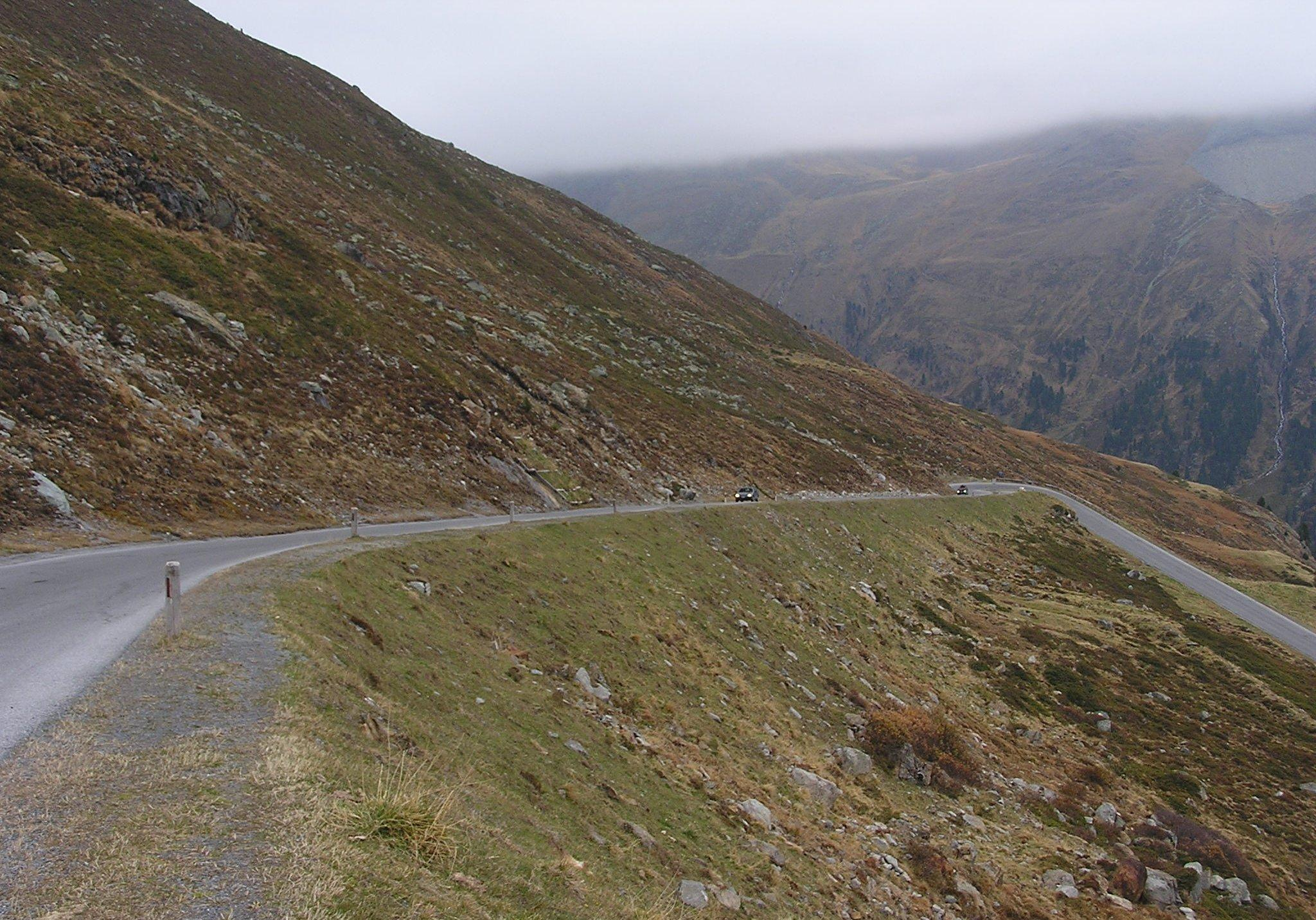 Kaunertaler Gletscherstrasse (südwestliches Tirol) über der Baumgrenze